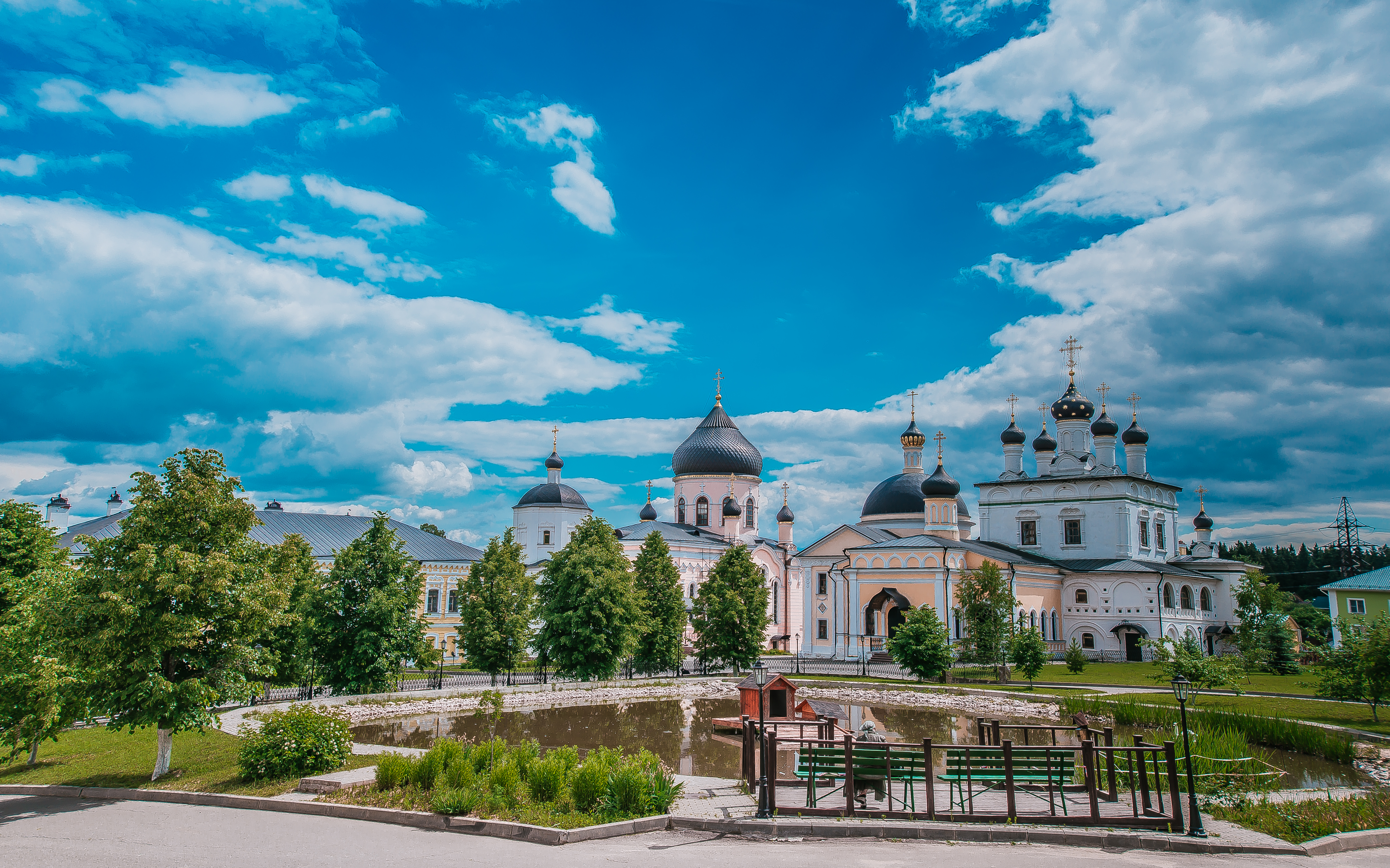 Монастырь «Вознесенская Давидова Пустынь »: Молодежная улица (Давыдова Пустынь), Новый Быт, Чеховский район, Московская область